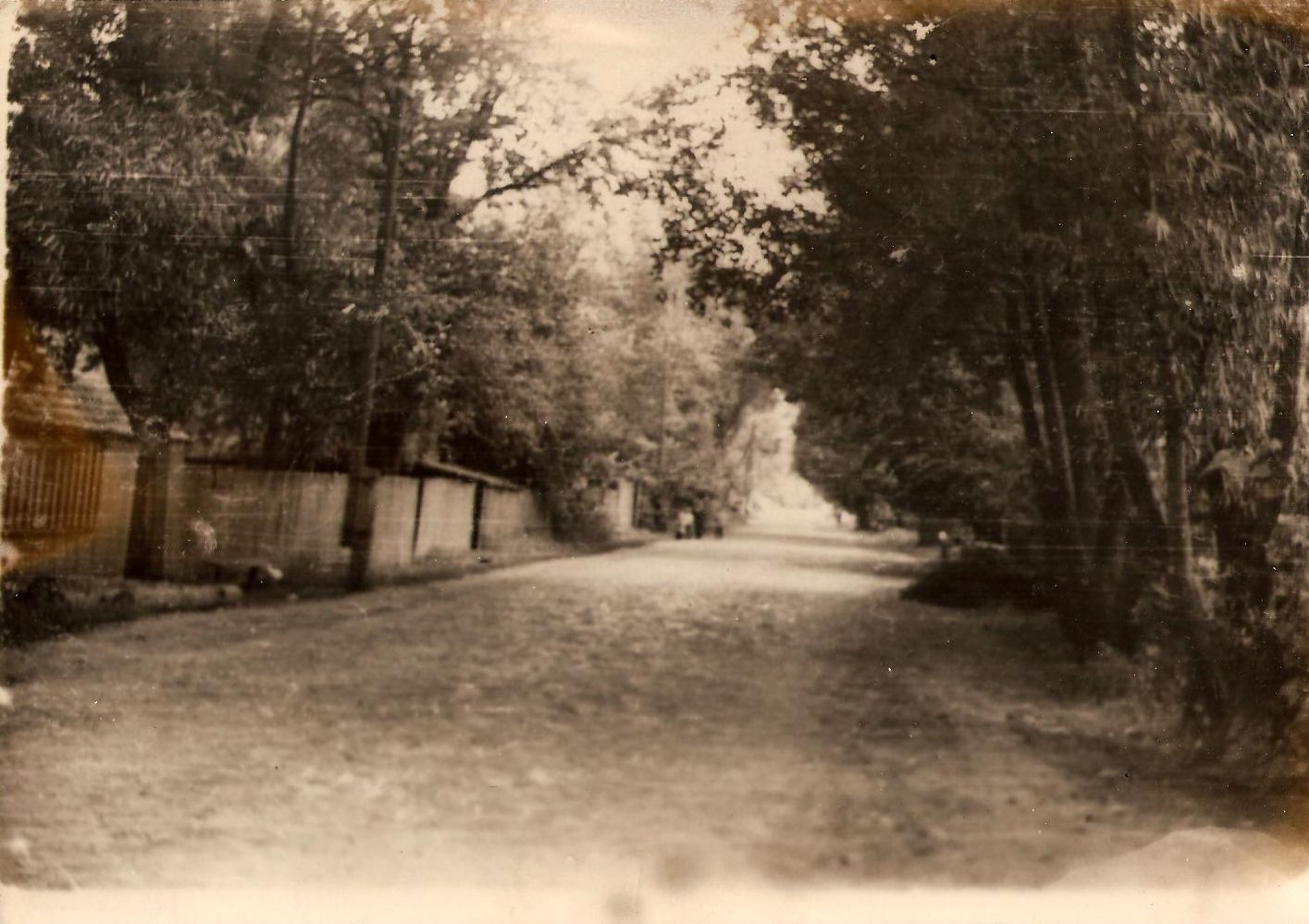 Село Куликівка Городнянського району, Чернігівської обл. 20 століття.